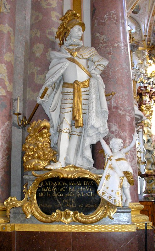 Klosterkirche Fürstenfeldbruck (Oberbayern). Herzog Ludwig der Strenge am Chorbogen (Roman Anton Boos, 1765/66). Eigene Aufnahme, Jan 2007 / Fürstenfeldbruck monastery (Upper Bavaria, Germany). Louis II, Duke of Bavaria. (Roman Anton Boos, 1765/66). Own photo, Jan 2007